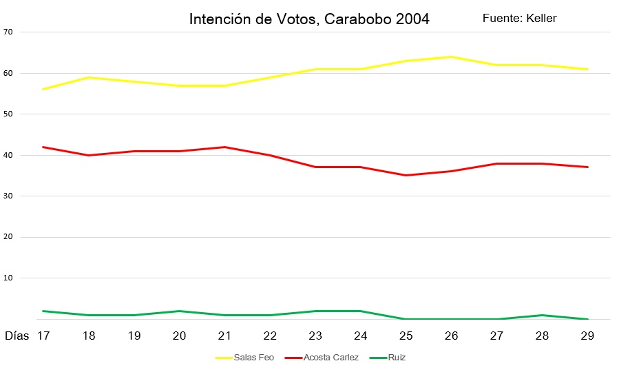 Encuesta realizada por Keller y Asociados, diariamente hasta el último día de la campaña.